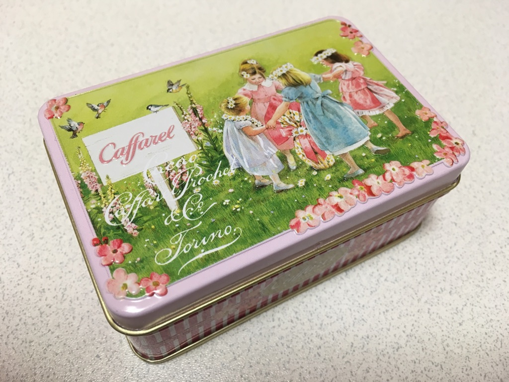 カファレル リバイバル小缶 ピンク 商品画像